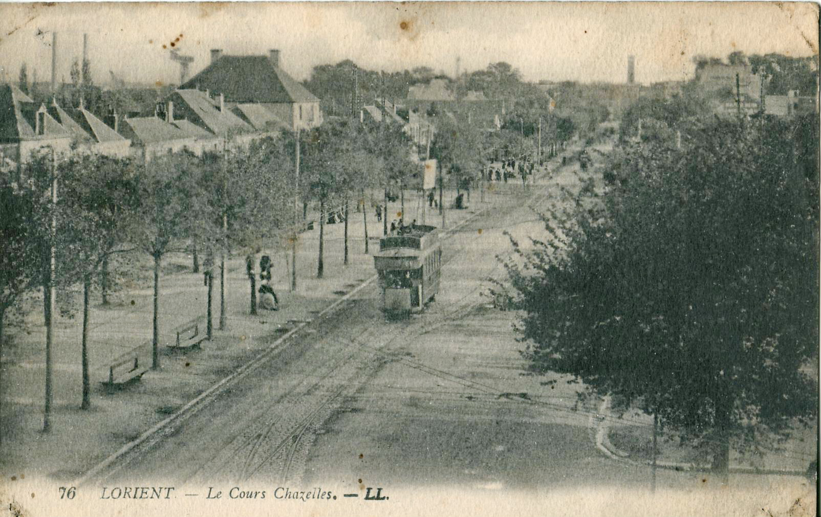 Carte postale ancienne éditée par LL, n°76 : LORIENT - Le Cours Chazeiles